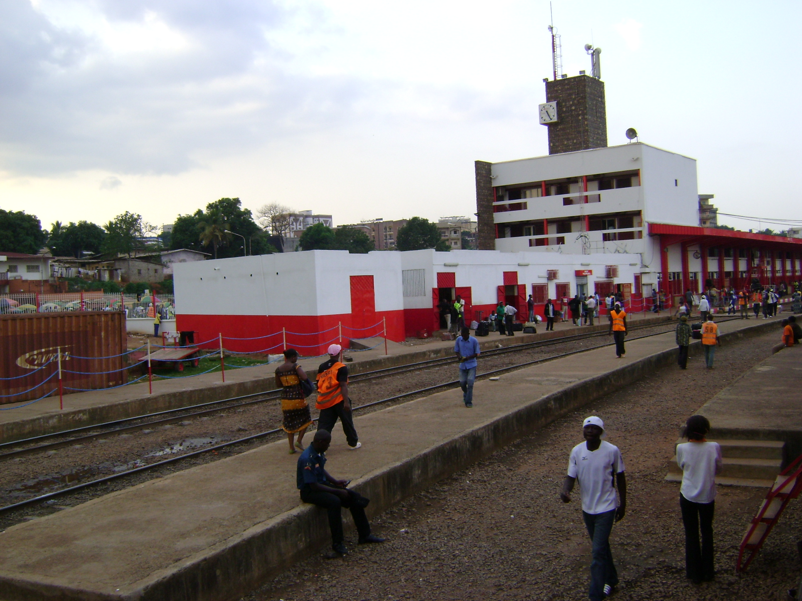 Interlingua: Stazione Ferroviaria di Yaoundé